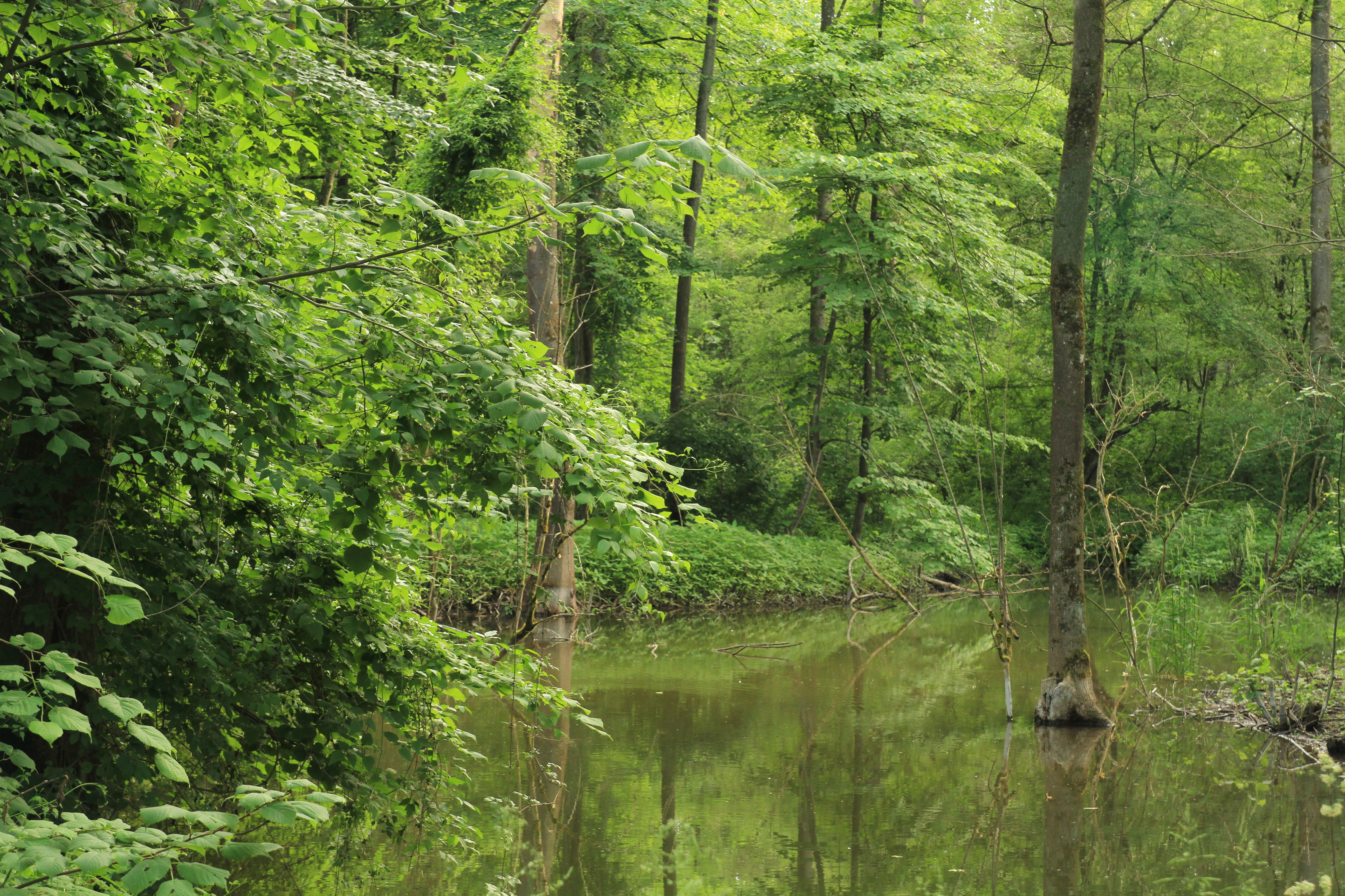 Eine der wenigen Stellen entlang der Isar im Großraum München die durch gelegentliche Überschwemmungen noch echten Auwaldcharakter hat.